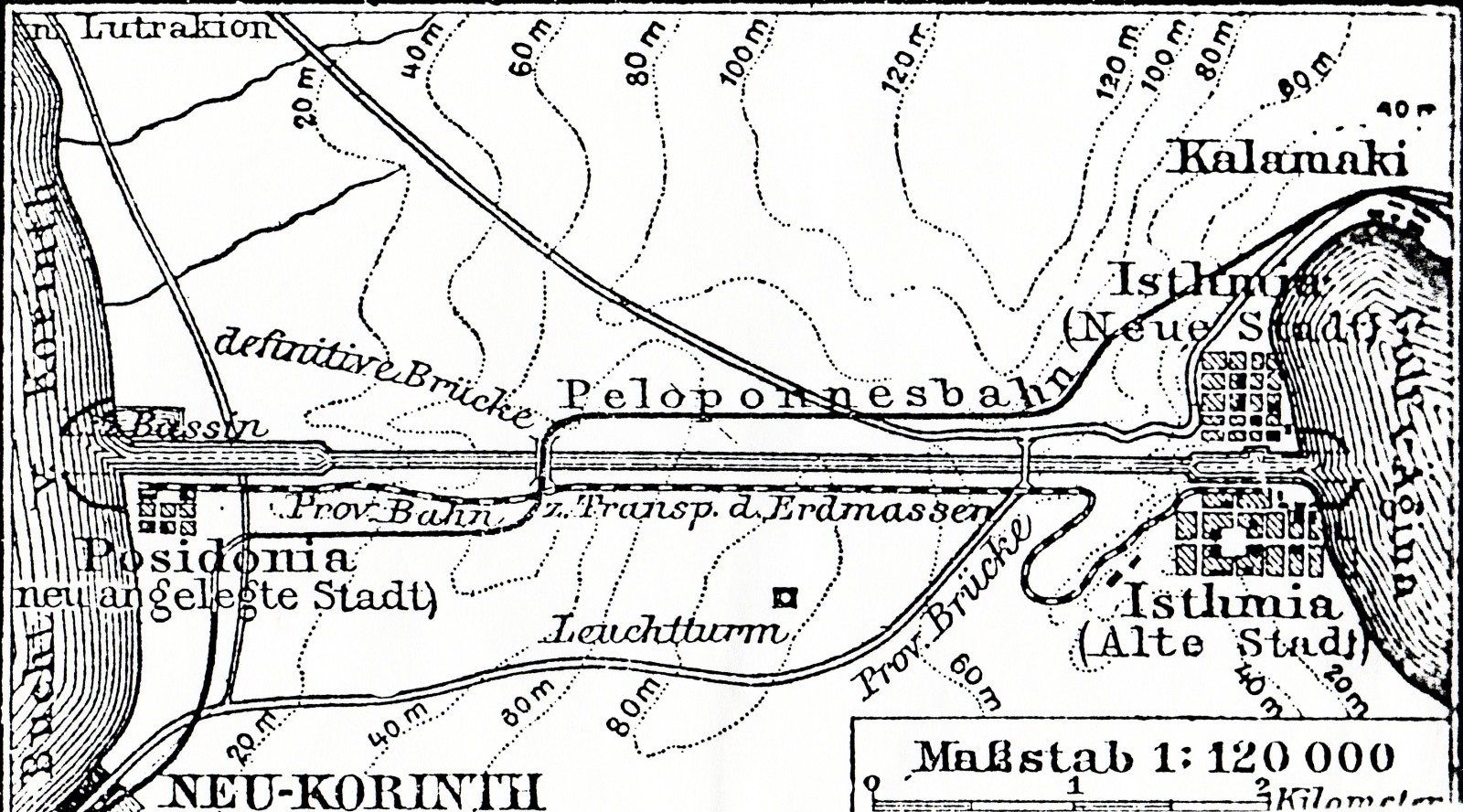 Kärtchen des Isthmus von Korinth